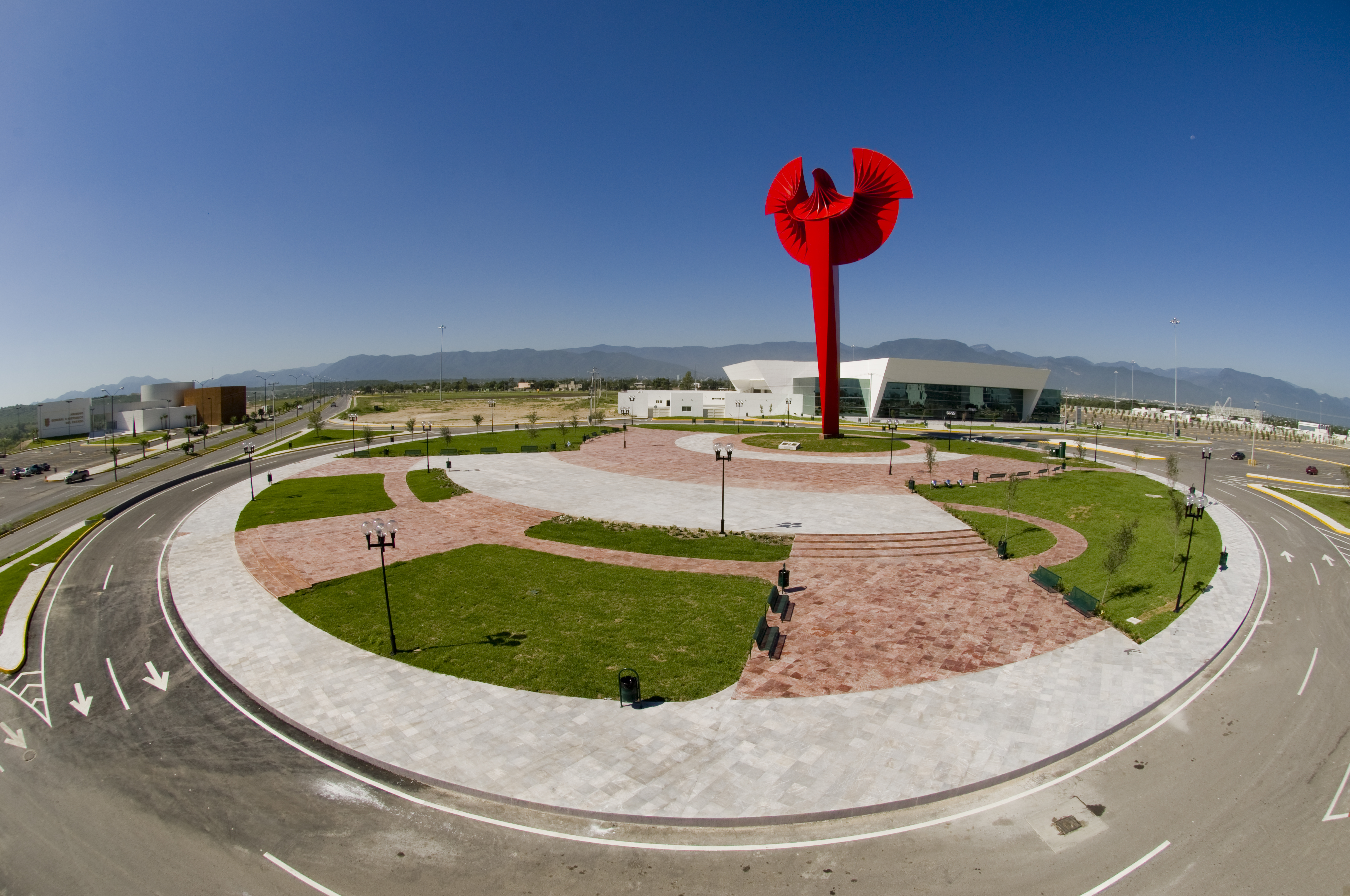 la Majestuosa obra de Enrique Carbajal